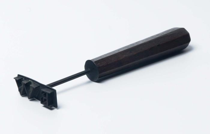 Brandijzer. Messingen merk met letters W en E. Nadat de slaven in de hoofdsteden van de koloniën verkocht waren aan hun nieuwe eigenaren, werden ze gebrandmerkt met zijn initialen, of die van de plantage waartoe ze vanaf dan behoorden.. Slavenstempel, waarmee slaven gebrandmerkt werden met de initialen van hun meester